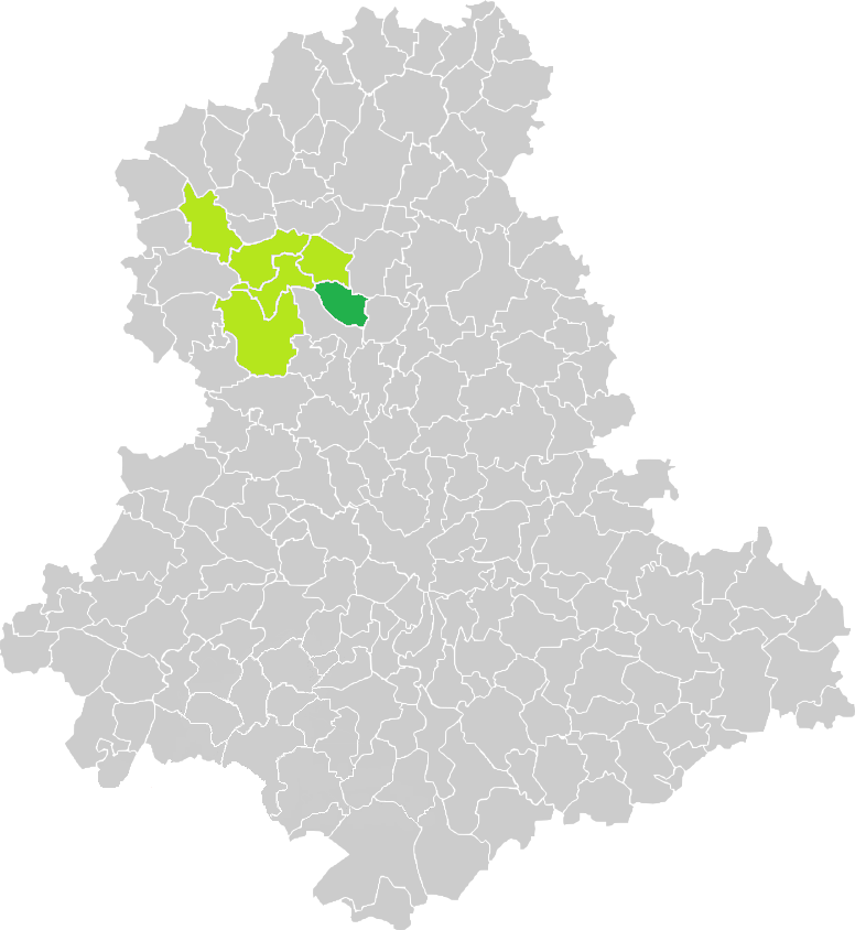 Carte de situation de la commune de Saint-Junien-les-Combes (en vert foncé) dans le votre Canton (en vert clair) sur une carte des communes de la Haute-Vienne